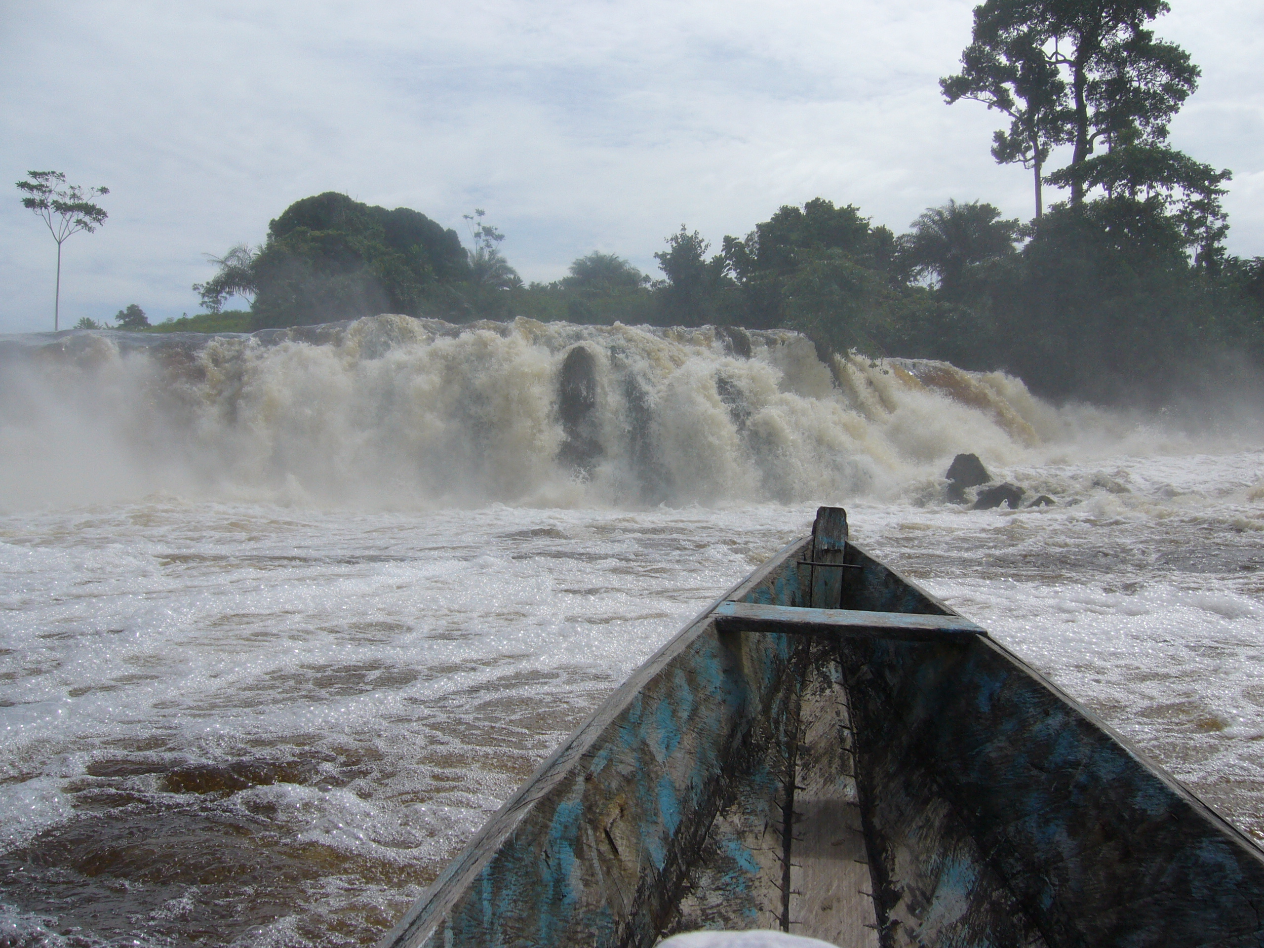 Cameroun - Kribi - Pirogue aux chutes de la Lobé : Le fleuve côtié, la Lobé, se jette dans l'Océan Atlantique par des cascades, dont une des chutes atteint 20 mètres de hauteur. This is an image with the theme "Africa on the Move or Transport" from: Cameroon